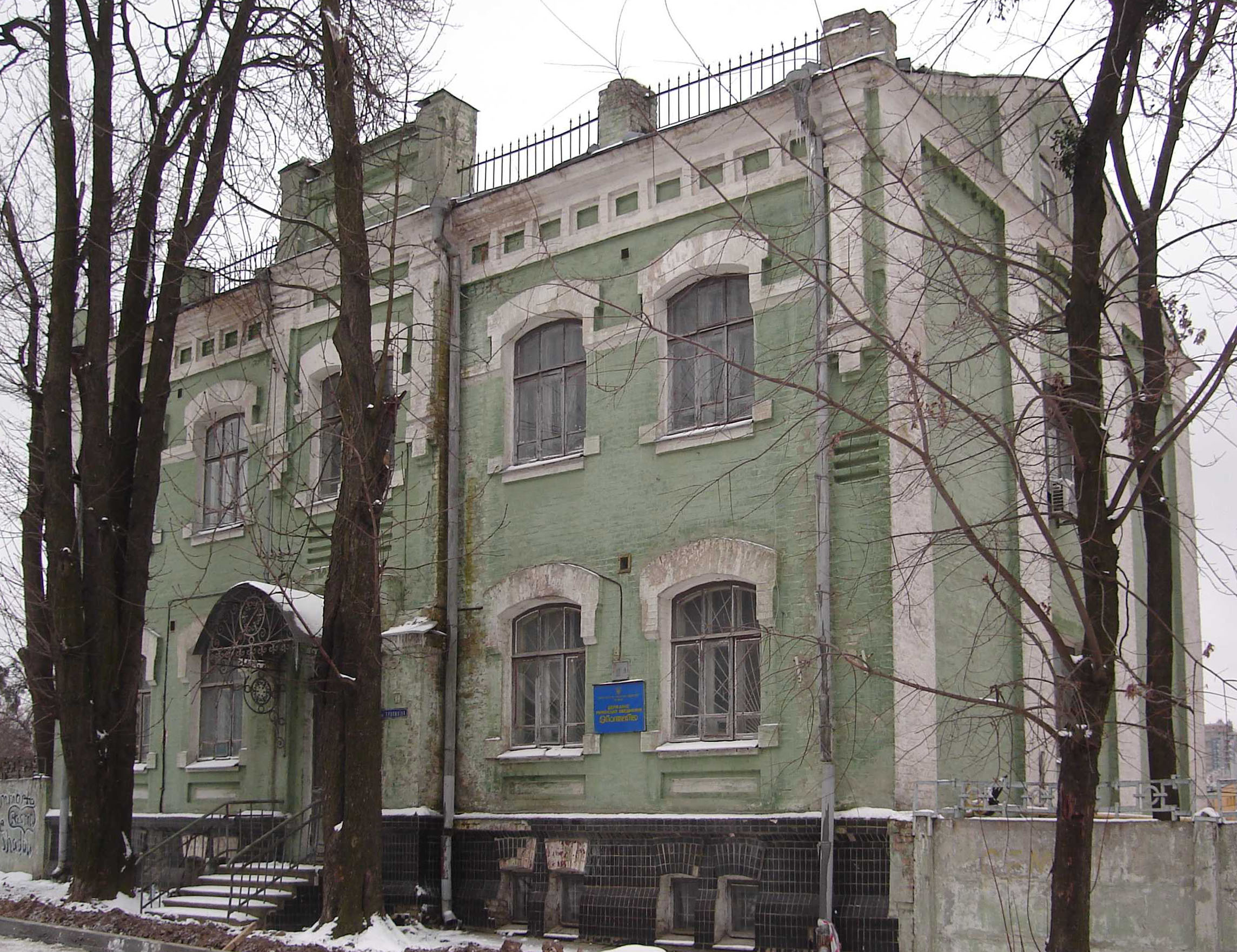 Будинок по вул.Тропініна, 10 у Києві. Чільний фасад. 2007 р.